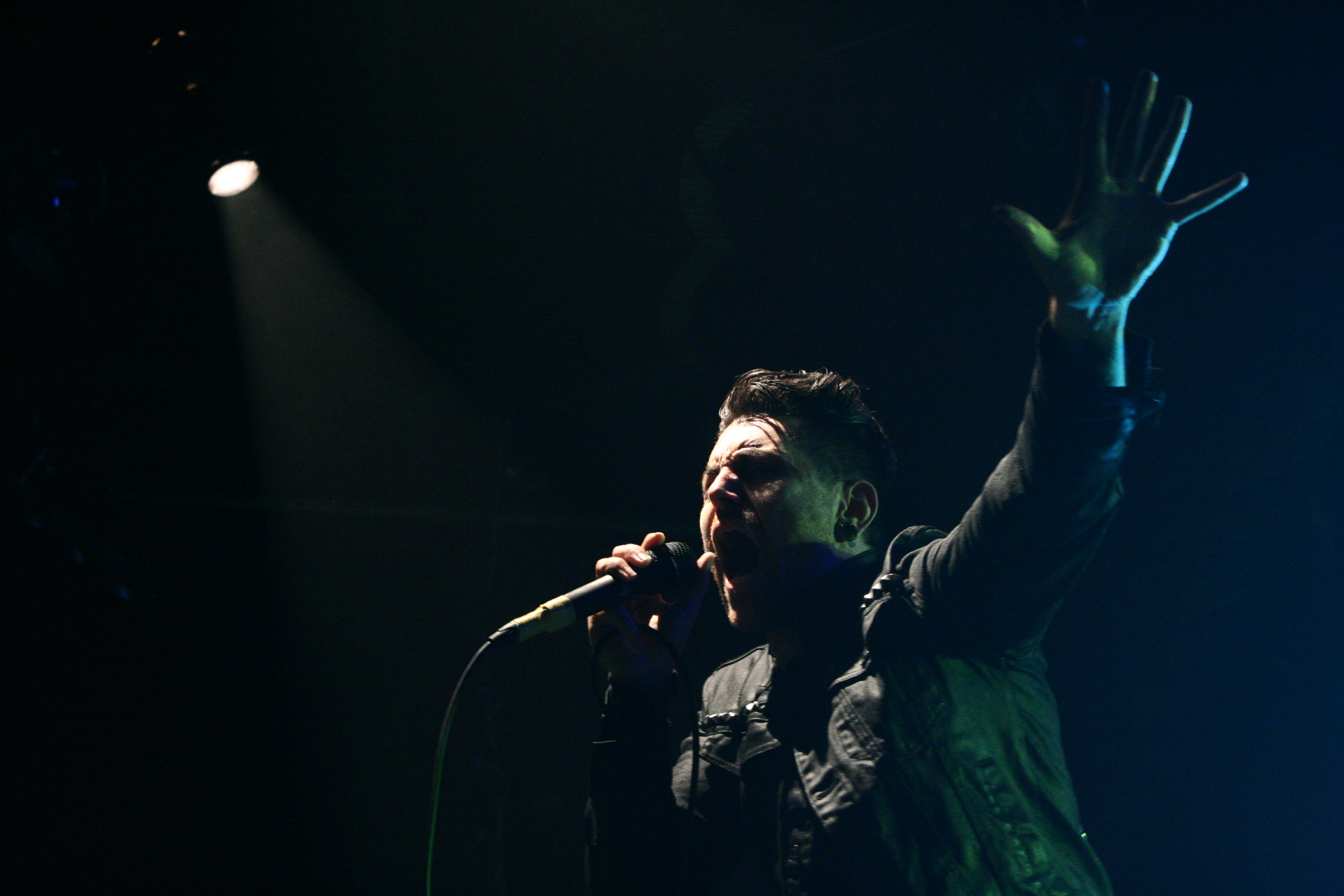 AFI en un presentación en el Royale Boston, Boston, el 7 de octubre de 2013.